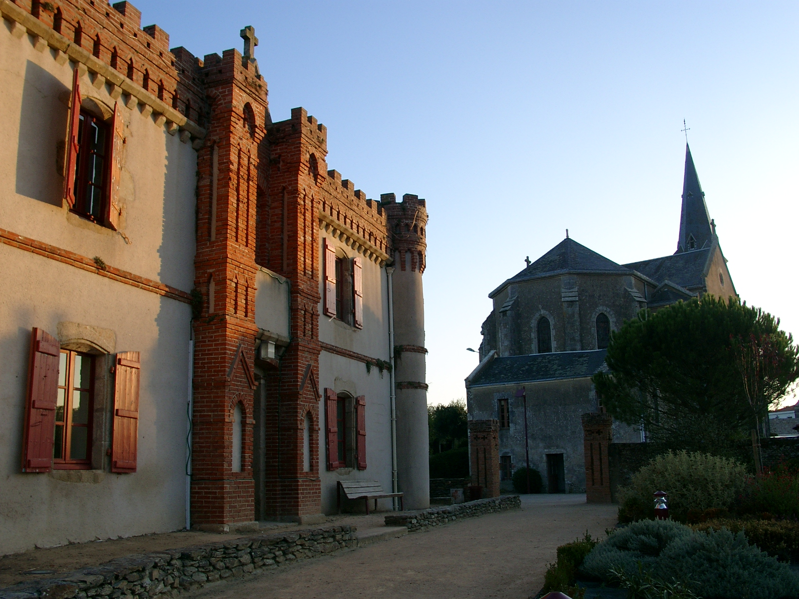 Eglise et château Gaillard village "Le Girouard"